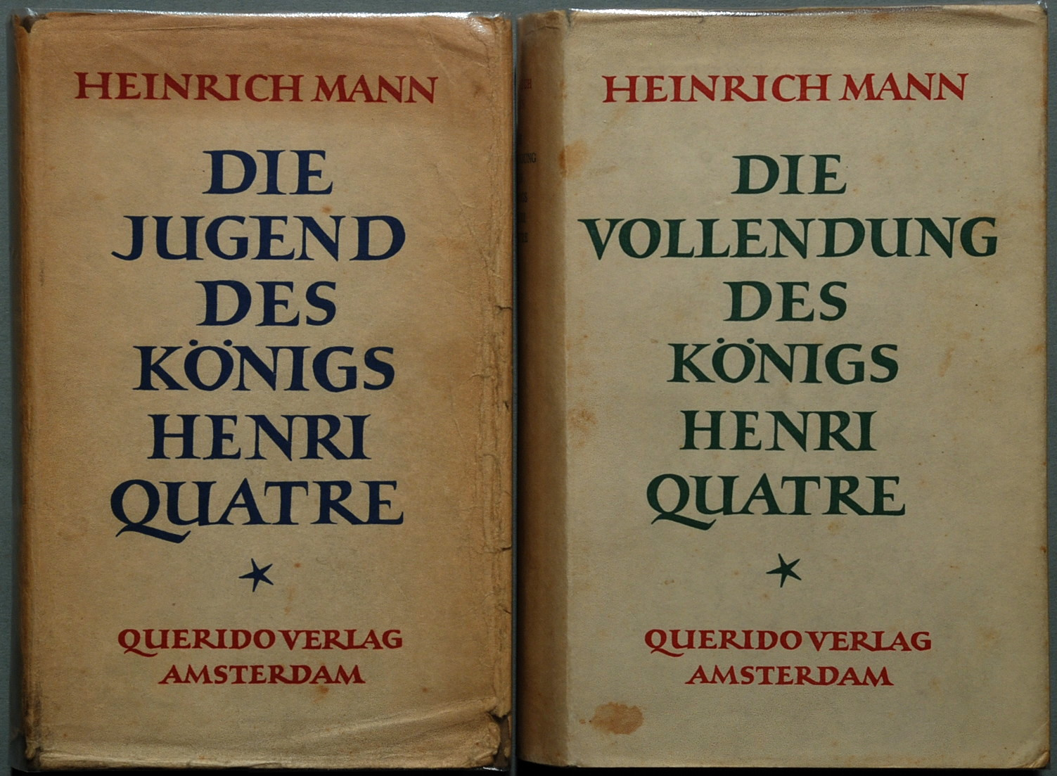 Original-Verlagsumschläge der Erstdrucke [in Klarsichtfolie eingelegt]